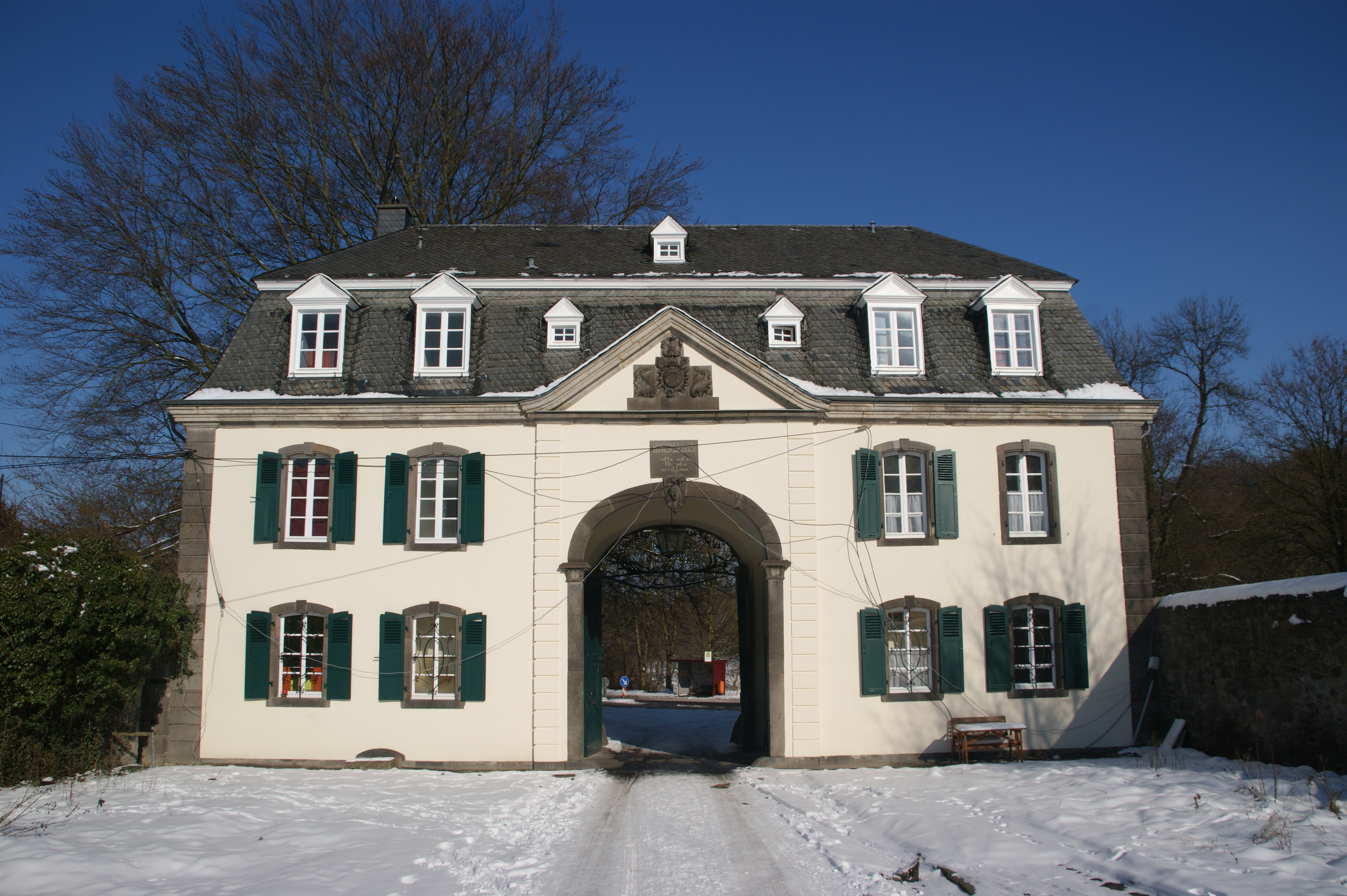 Barockes Eingangsgebäude der ehemaligen Abtei Heisterbach